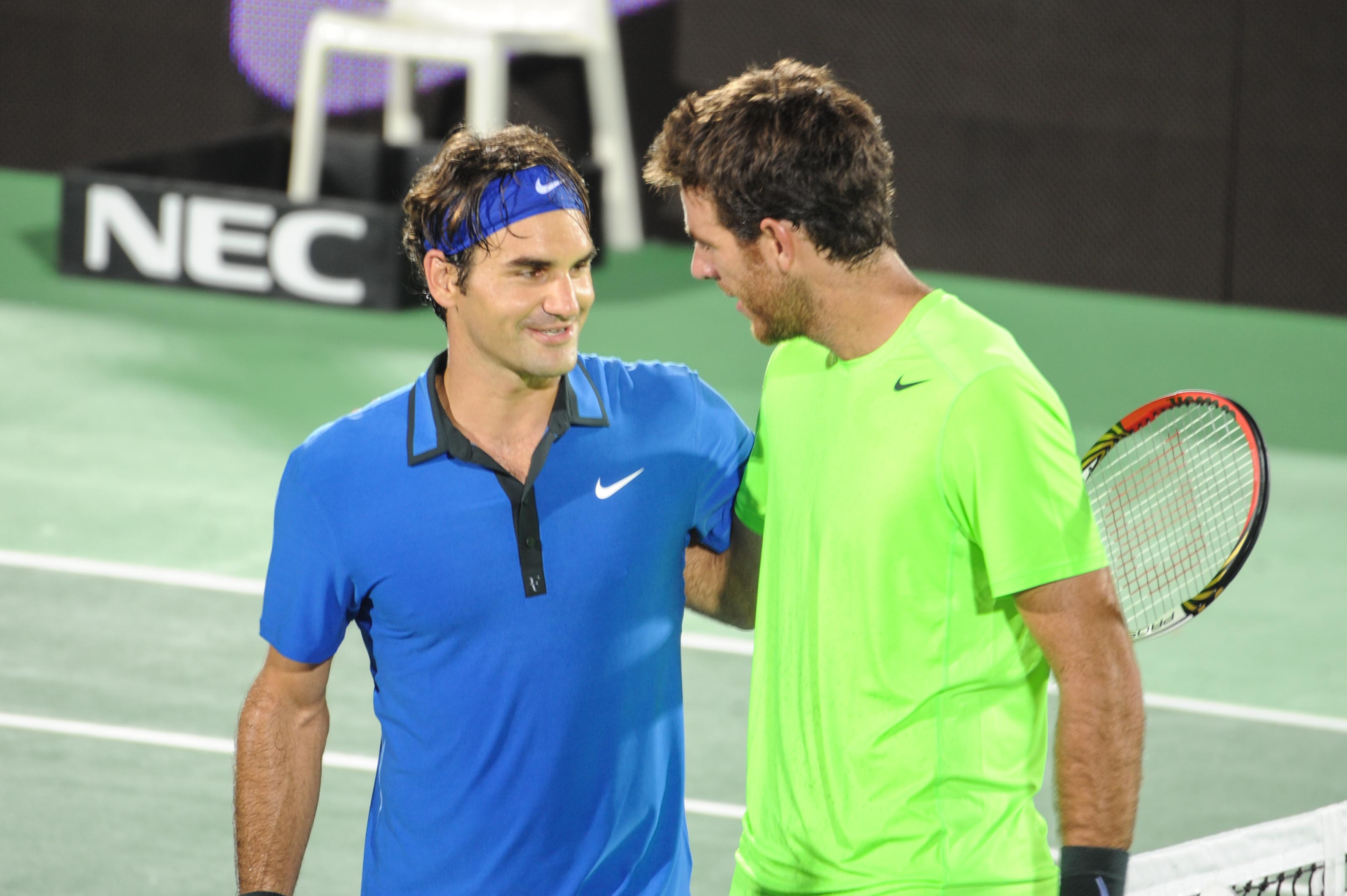 Roger Federer Vs. Juan Martín Del Potro en Tigre, Buenos Aires, Argentina